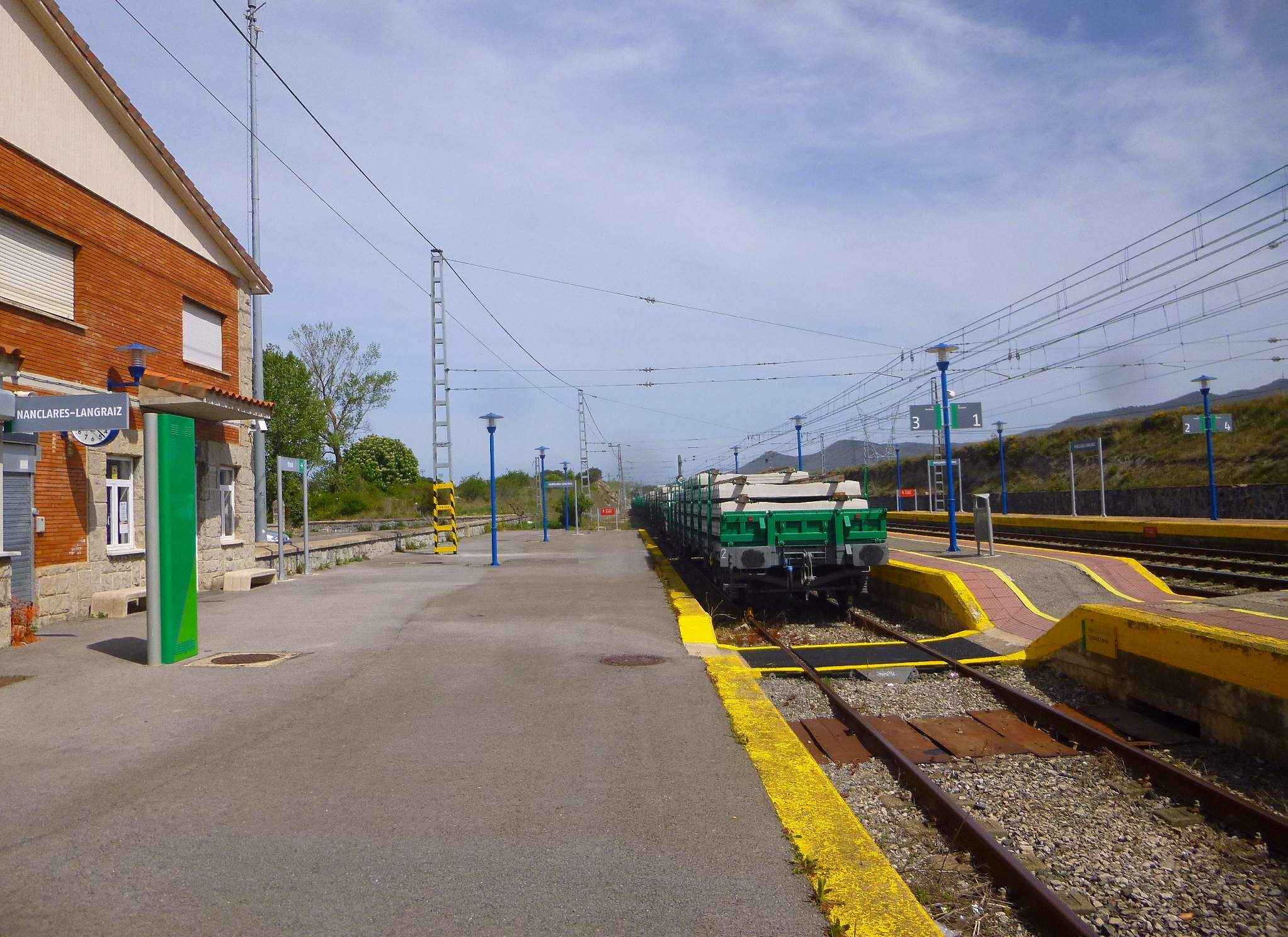 Nanclares de la Oca - Estación de Adif